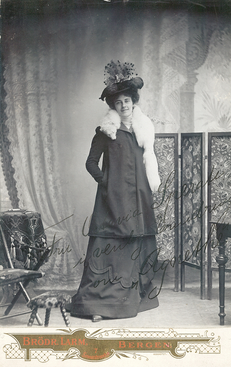 Fotografiet er tatt av Brødrene Larm i 1901 og tilhører Oslo Museums samlinger.